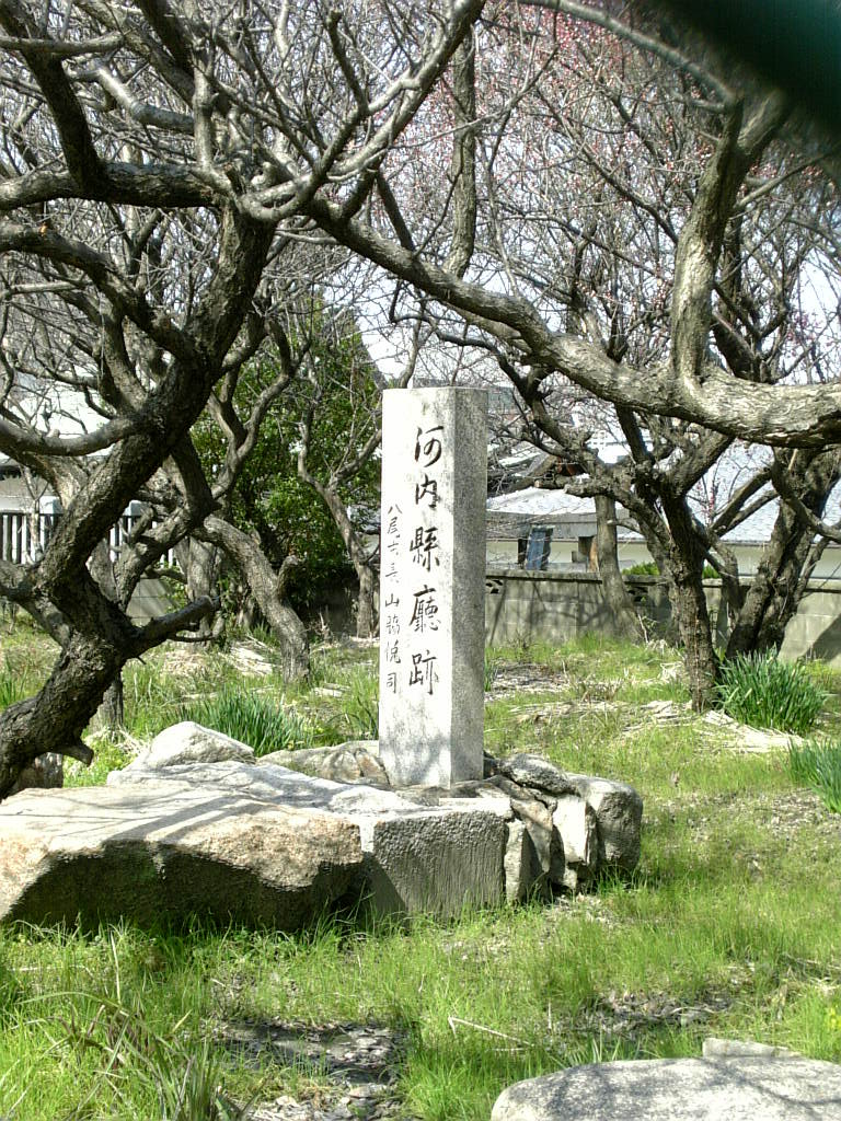 Kawachi-pref._monument in Yao, Osaka, Japan